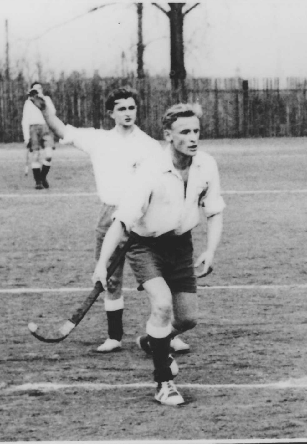 Foto von Gerhard Herrling